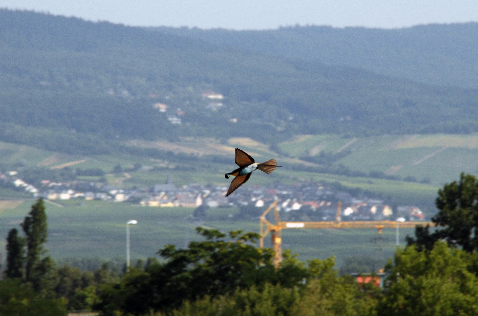 Bienenfresser Merops apiaster, Ingelheim, Rheinland-Pfalz, Deutschland